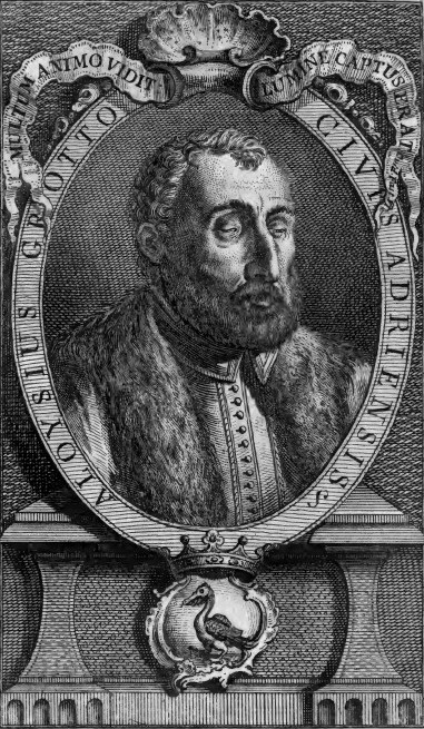 Giuseppe Groto, La vita di Luigi Grotto, cieco d'Adria, Rovigo, Jacopo Miazzi, 1777: miniatura di Luigi Groto detto il Cieco d'Adria.